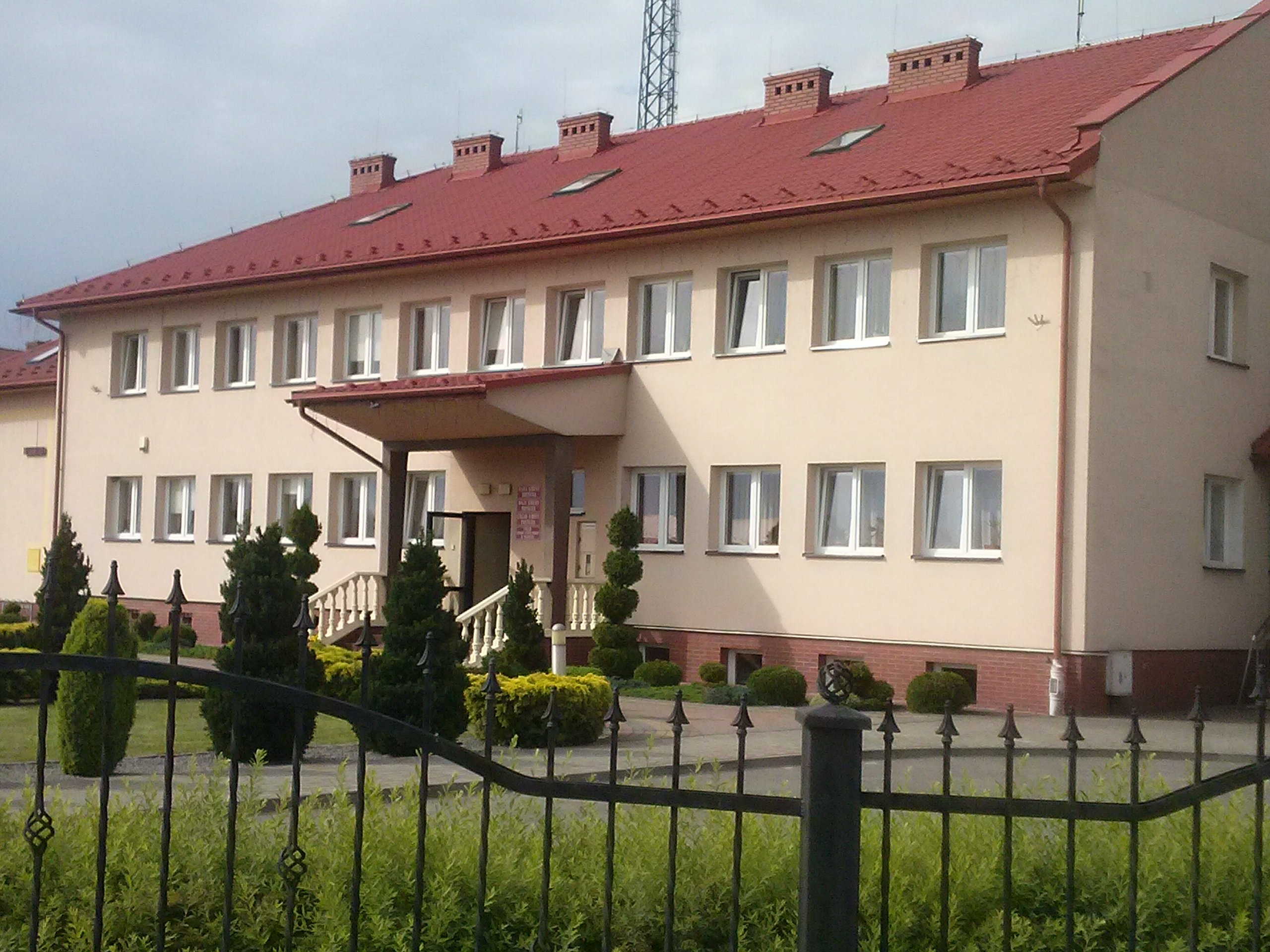 Budynek Urzędu Gminy w Tryńczy